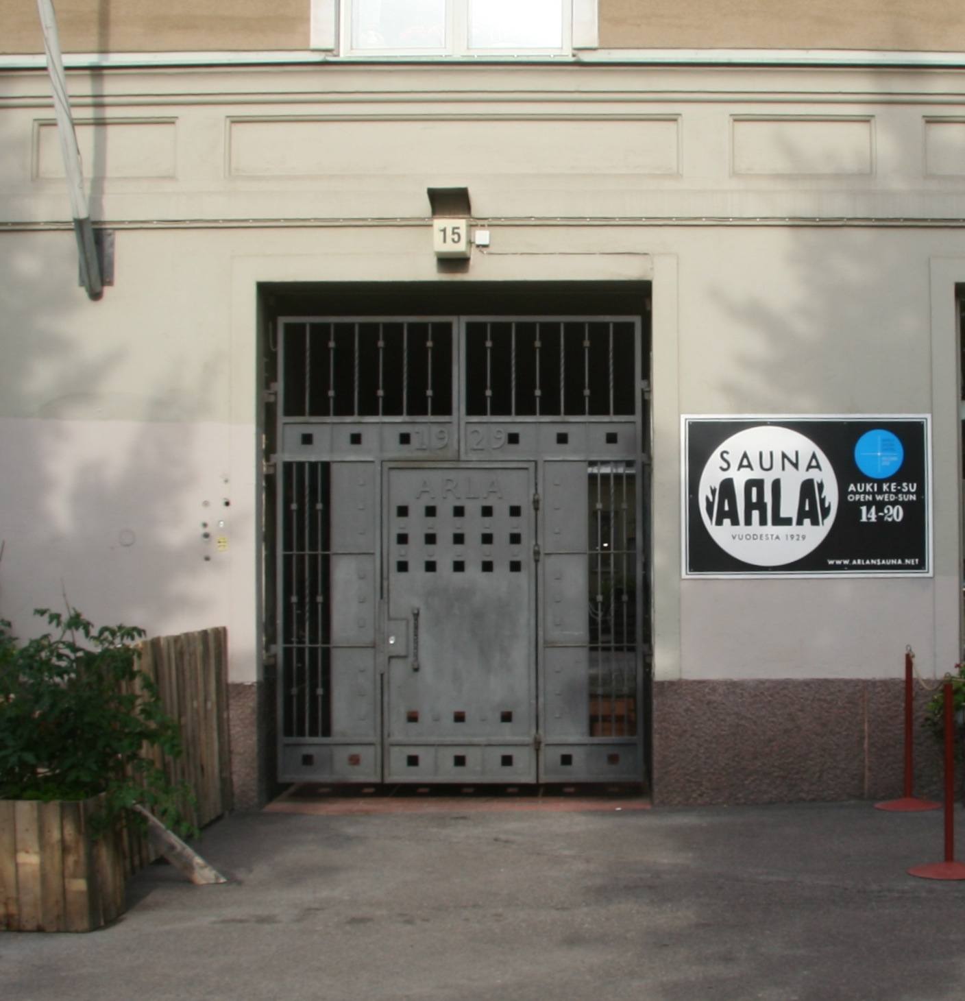 Arlan Sauna, Kallio, Helsinki